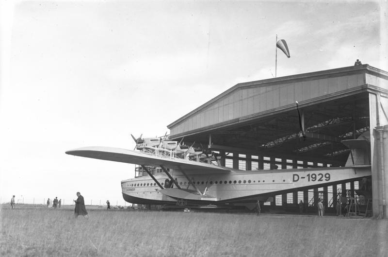 Das Riesenflugboot "Do X" startet zum ersten Europa- und Amerika-Flug! Die erste Etappe führt das Flugschiff von Altenrhein/Schweiz nach Amsterdam. Von hier aus besucht das Flugboot die englische Hafenstadt Southhampton, wo sie vom Prinzen of Wales besichtigt wird. Dann fliegt sie weiter nach Cherbourg und Lissabon, von wo der endgültige Start über den Ozean nach Amerika stattfindet. Das Riesenflugboot "Do X" wird in Altenrhein am Bodensee aus der Halle gebracht.